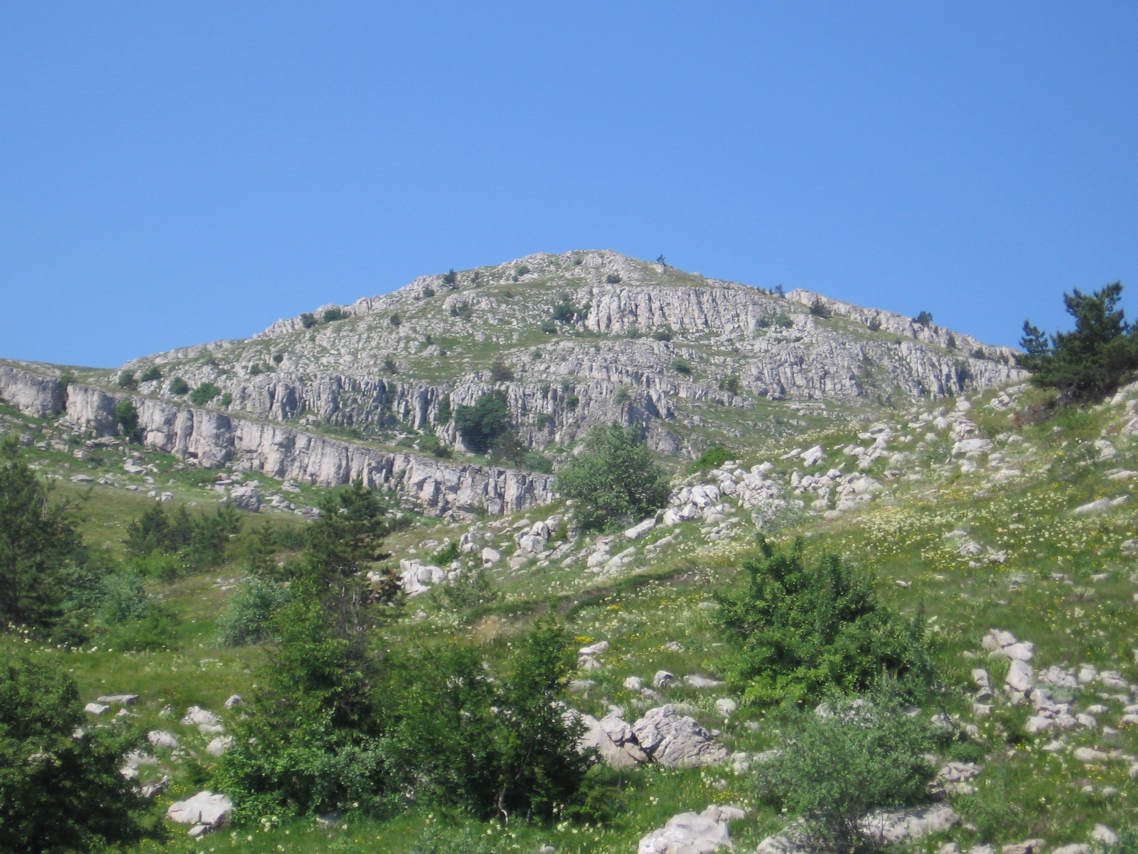 Черкез-Кош